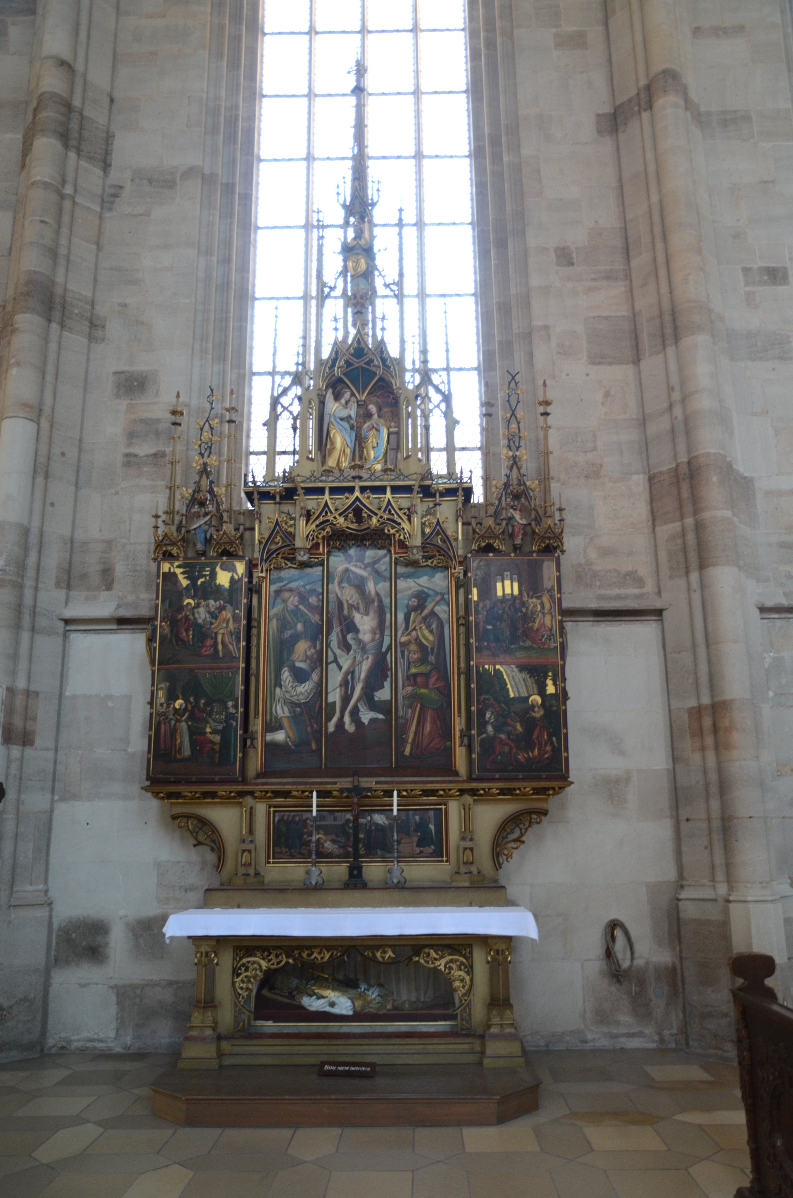 Dinkelsbühl St. Georg Sebastiansaltar